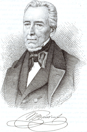 Een gravure van een volwassen Franciscus-Joannes Bouwens, verschenen in de achttiende jaargang van de Vlaamsche School, 1872.